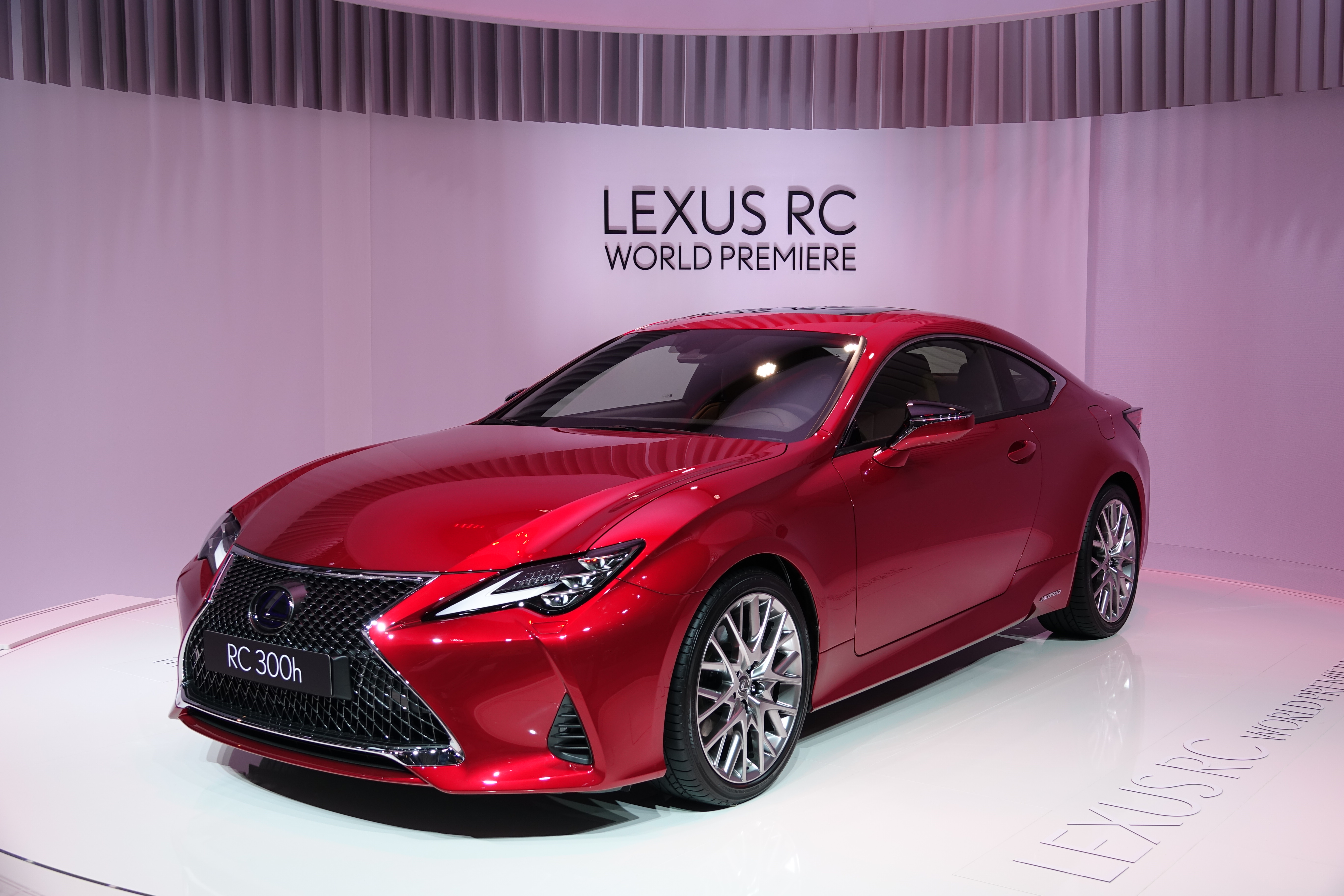 Lexus RC au Mondial de l’Automobile de Paris 2018